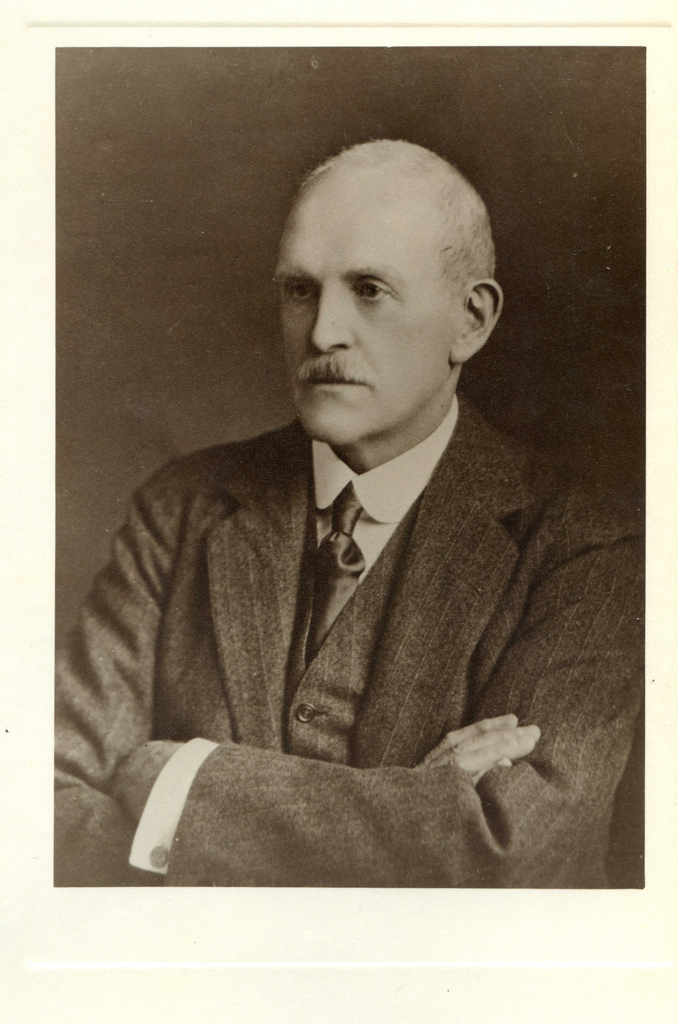 Henry Givens Burgess (1859–1937)